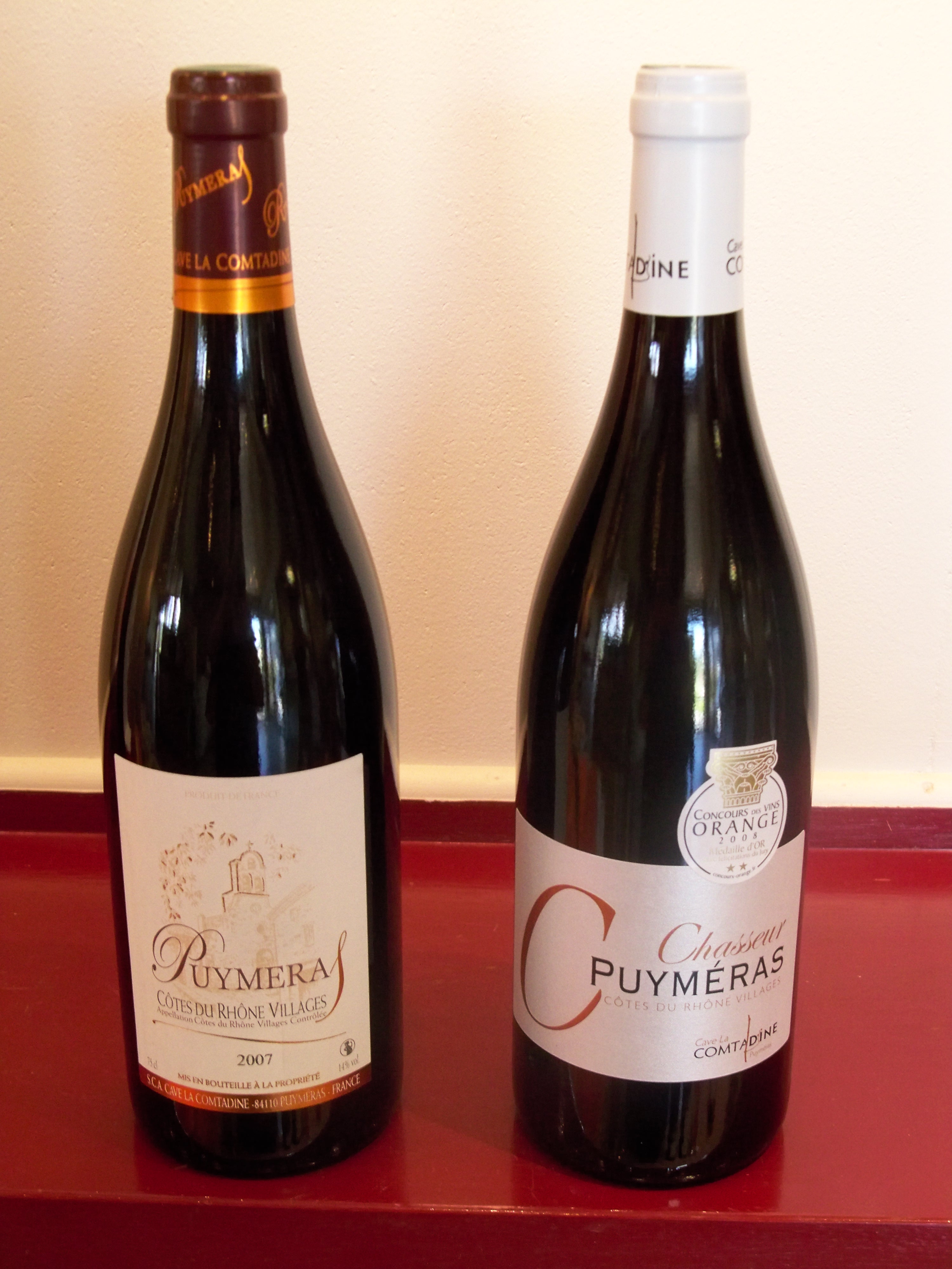 Bouteilles d'AOC Puyméras rouge, Vaucluse